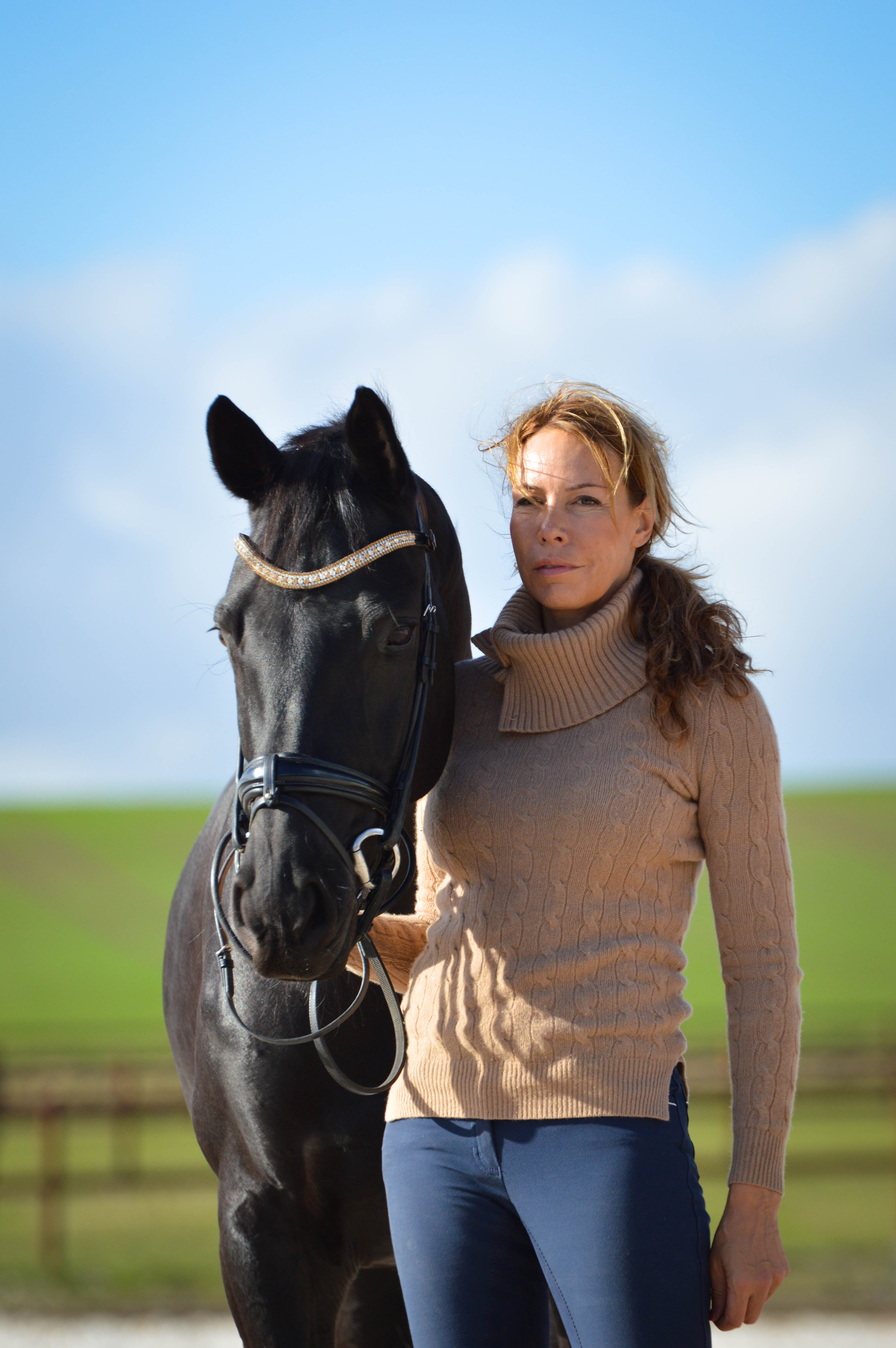 Tv-chefen Anna Bråkenhielm.